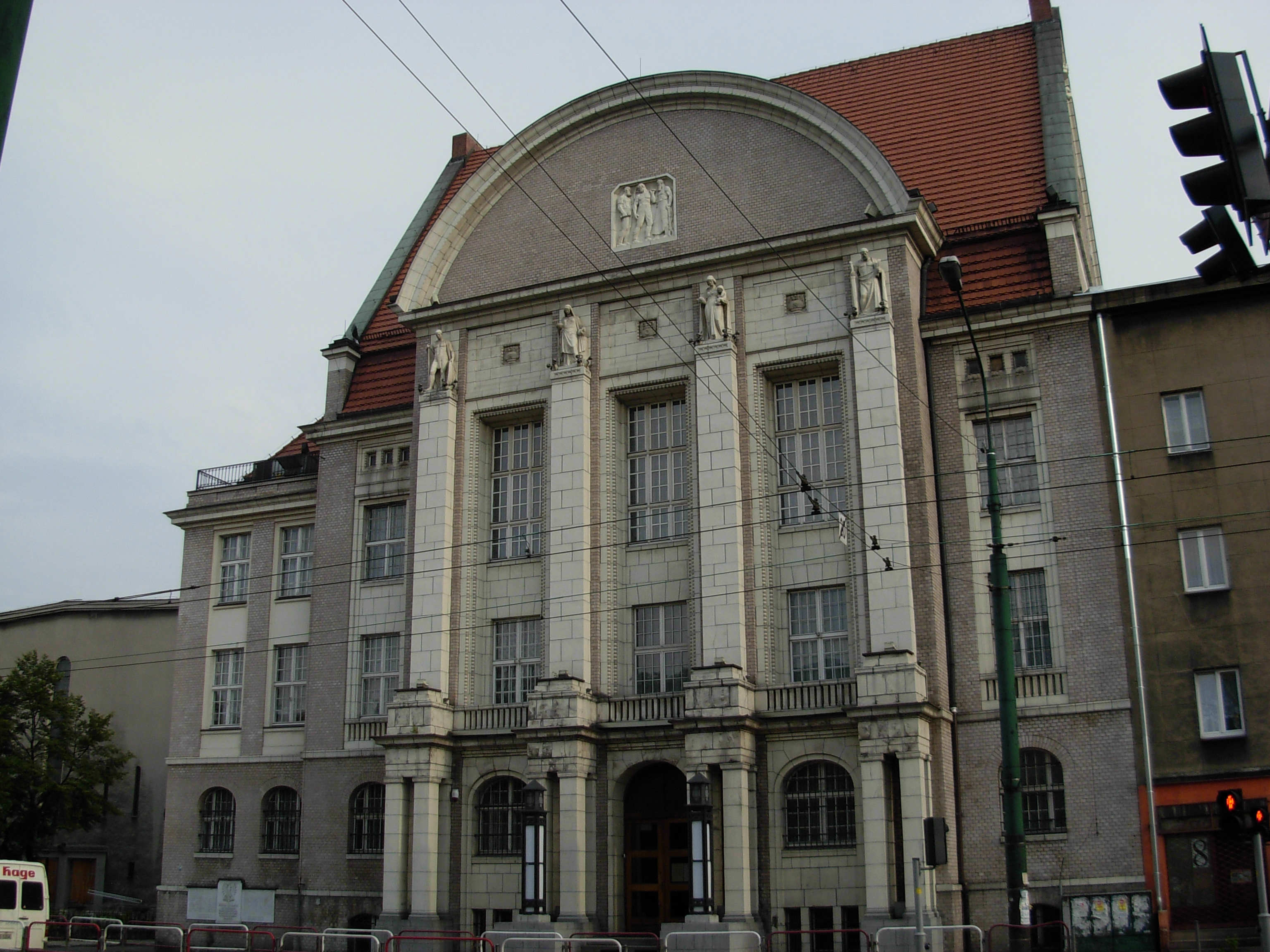 Katowice Bogucice, ul. 1 Maja 50 - dawny Ratusz w Bogucicach, obecnie rektorat Uniwersytetu Ekonomicznego (zabytek nr A/1234/78 z 19.08.1978 )